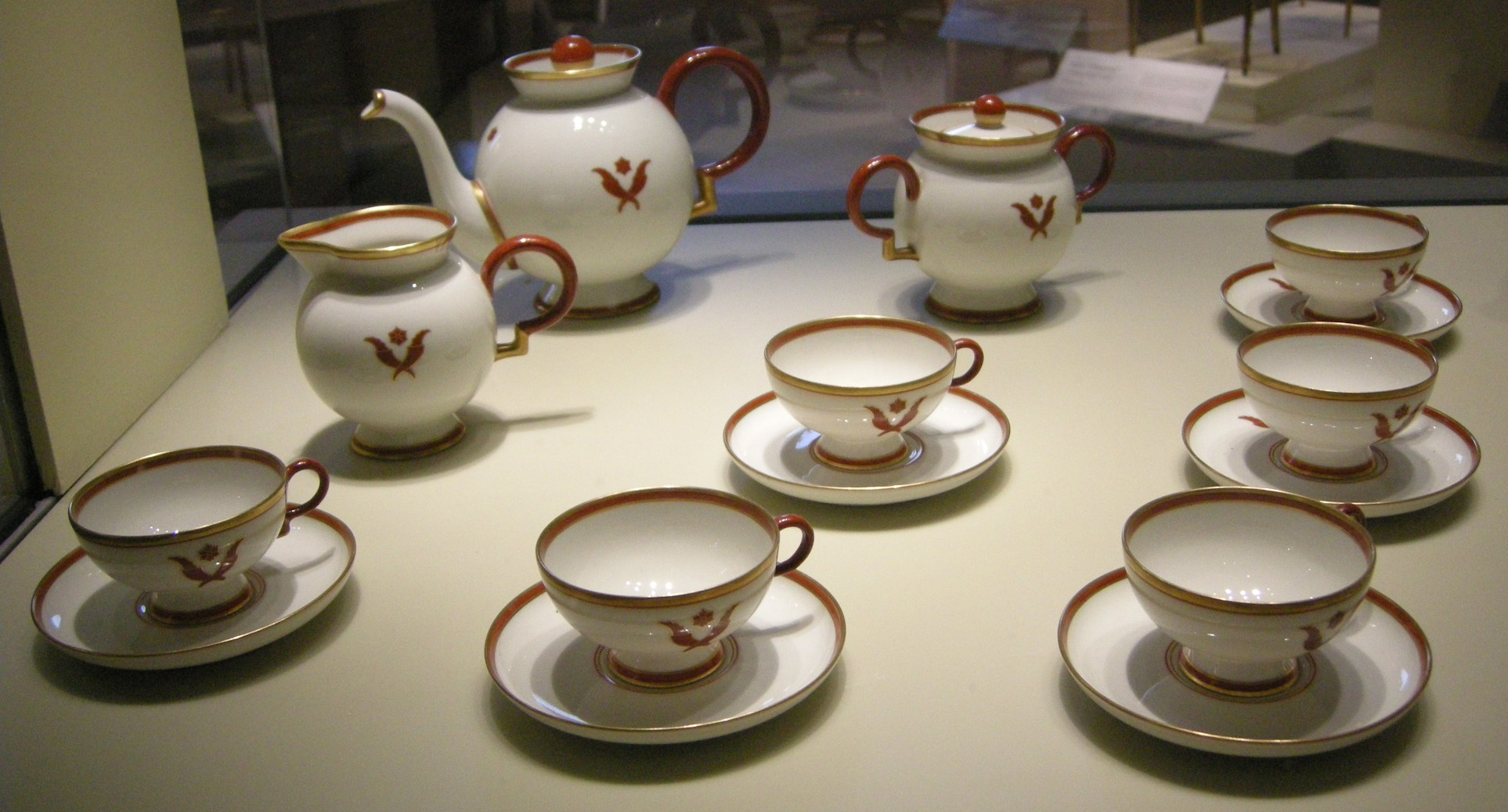 Giò ponti per richard-ginori, servizio da caffè, 1930-35